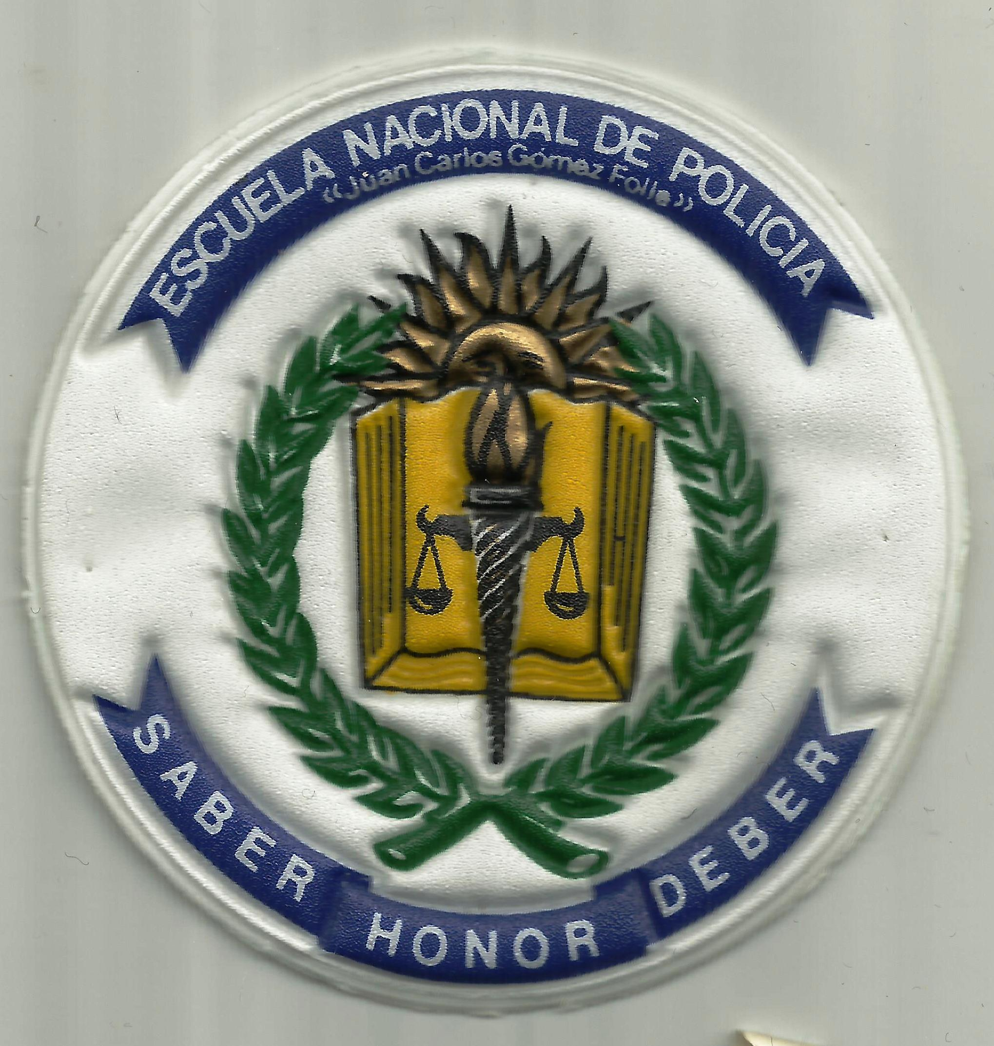 Politie embleem Uruguay